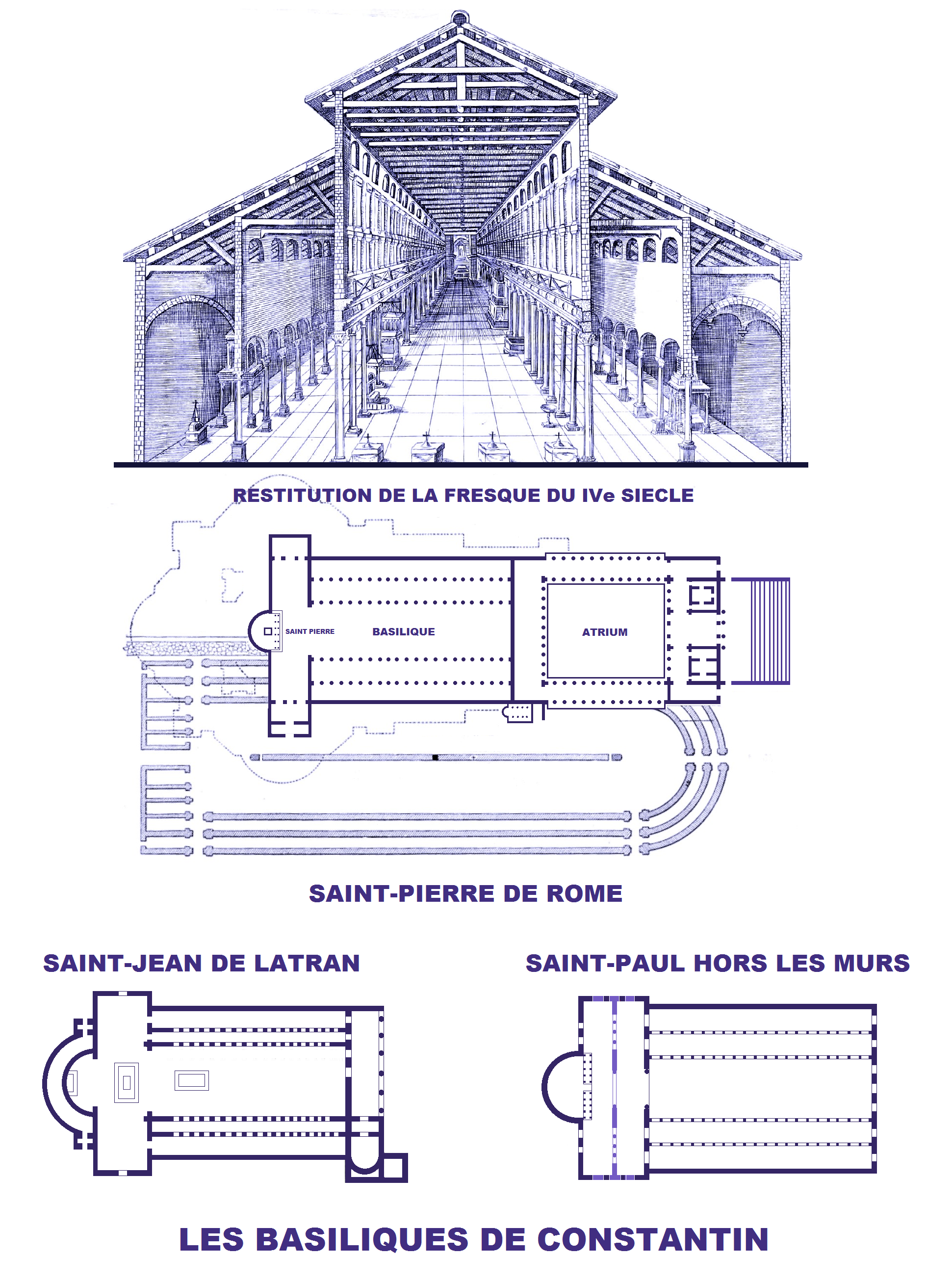 Saint-Pierre de Rome à l'époque de Constantin (images Commons modifiées)